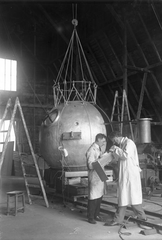 Der Flug mit dem Luftballon in die Stratosphäre! Der Schweizer Prof. Piccard will mit einem Ballon in bisher unerreichte Höhen fliegen, um dort wissenschaftliche Forschungen zu unternehmen. Die Gondel des Ballons besteht aus einer Alluminium-Kugel, welche einen Umfang von 6 1/2 m und eine Höhe von 2 1/2 m hat. Die Alluminiumkugel kann hermetisch verschlossen werden, um die kühnen Forscher vor der enormen Kälte und den gefährlichen ultravioletten Strahlen zu schützen. - Prof. Piccard beim Prüfen wichtiger Instrumente. Im Hintergrund die Alluminium-Ballon-Kugel.